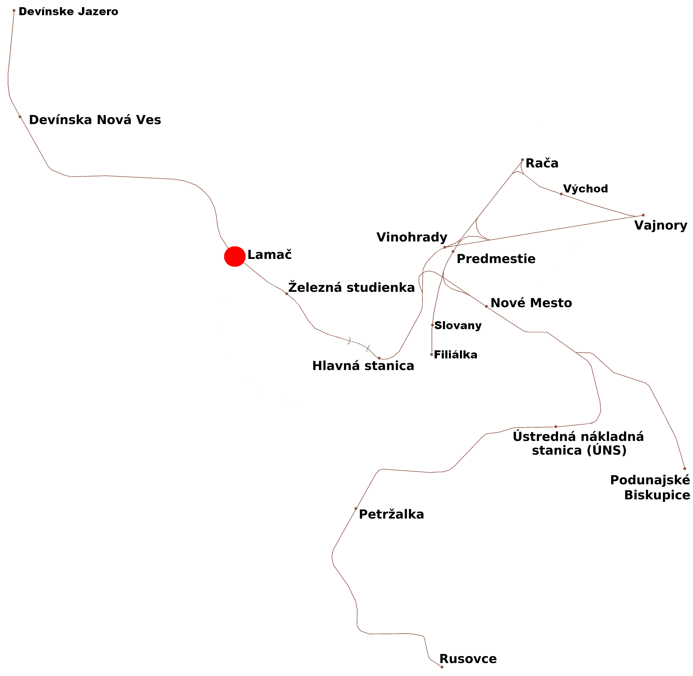 SK - Lokalizácia železničnej stanice Bratislava-Lamač EN - Bratislava-Lamač (Slovakia) Railway station locality.